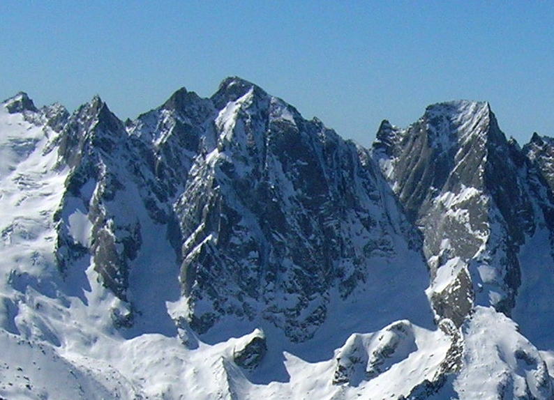 Gemelli Cengalo Badile da nord